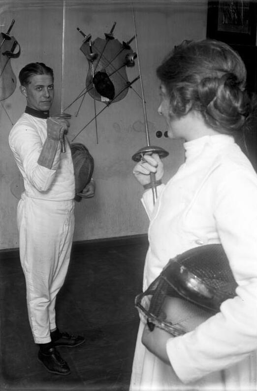 Aus der Berliner Damen-Fecht-Akademie! Damen-Florett-Fechten ist ein eleganter, graziöser Sport, der geistige Conzentration und gute Nerven erfordert und kann dadurch das Florett in der Hand einer Dame zu einer gefährlichen Waffe werden. Hier entscheidet nicht die Kraft, sondern die Überlegenheit des Geistes. Der deutsche Florettmeister Morero erzieht die Damen in der Berliner Fecht-Akademie zu diesem schönen Sport. Für den Zuschauer bedeutet die gute Fechterin einen erlesenen Genuss. Die Spannkraft des Körpers, die zarte federnde Körperbewegung, der schnelle Entschluss, geben Momente von ungewöhnlichem Reiz. Der Gruss. Die Florettfechterin begrüßt den Meister im Florettfechten Morero.